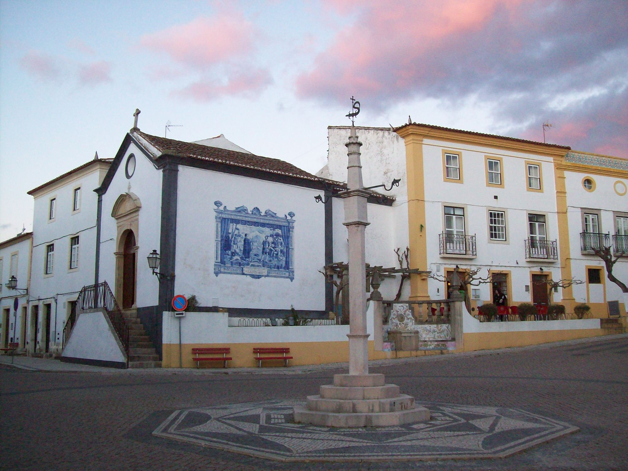 Vila do Sardoal